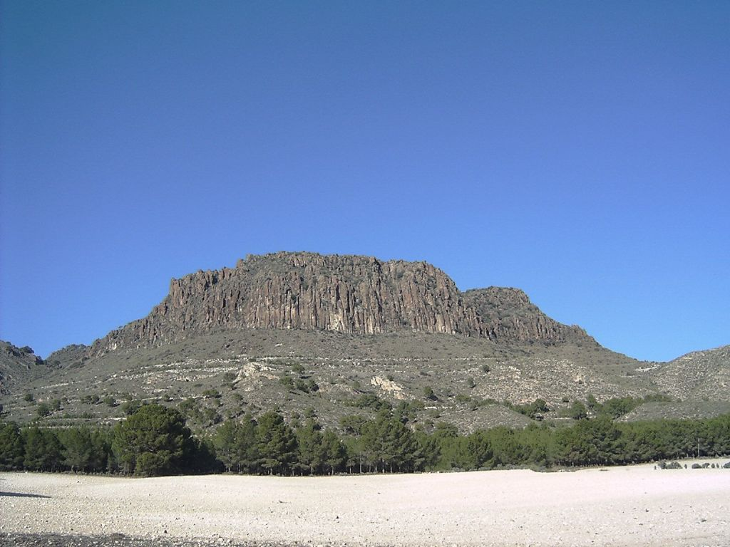 Cancarix, Hellín, Albacete, España. Monumento natural del Pitón Volcánico de Cancarix. Cara sur. Diciembre de 2005. -- Cancarix, Hellin, Albacete, Spain. Natural monument of the "piton volcanico" in Cancarix. South side. December 2005. -- Own picture, given to PD.